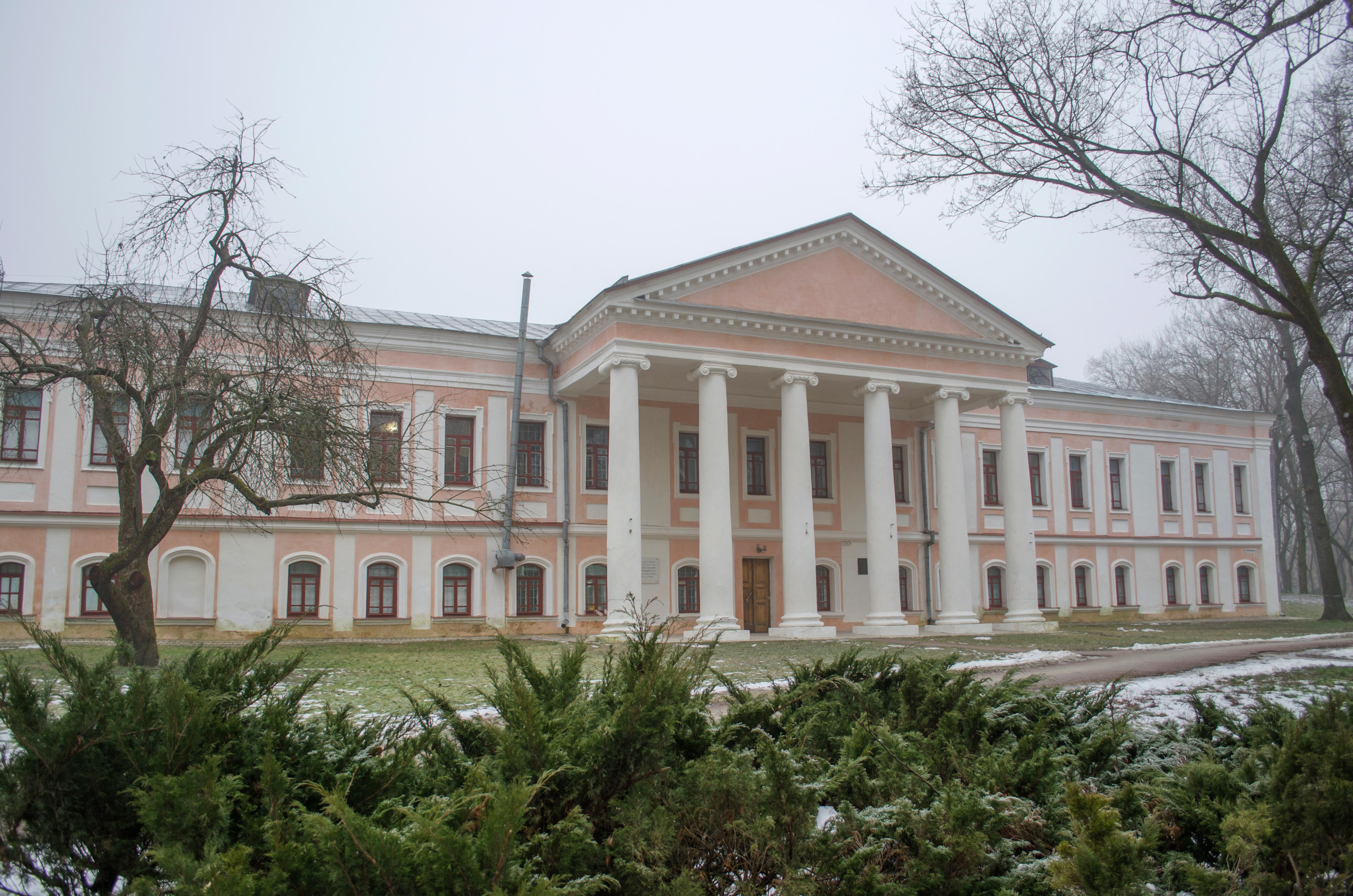 Будинок архієпископа (мур.), Чернігів, вул.Мстиславська, 2